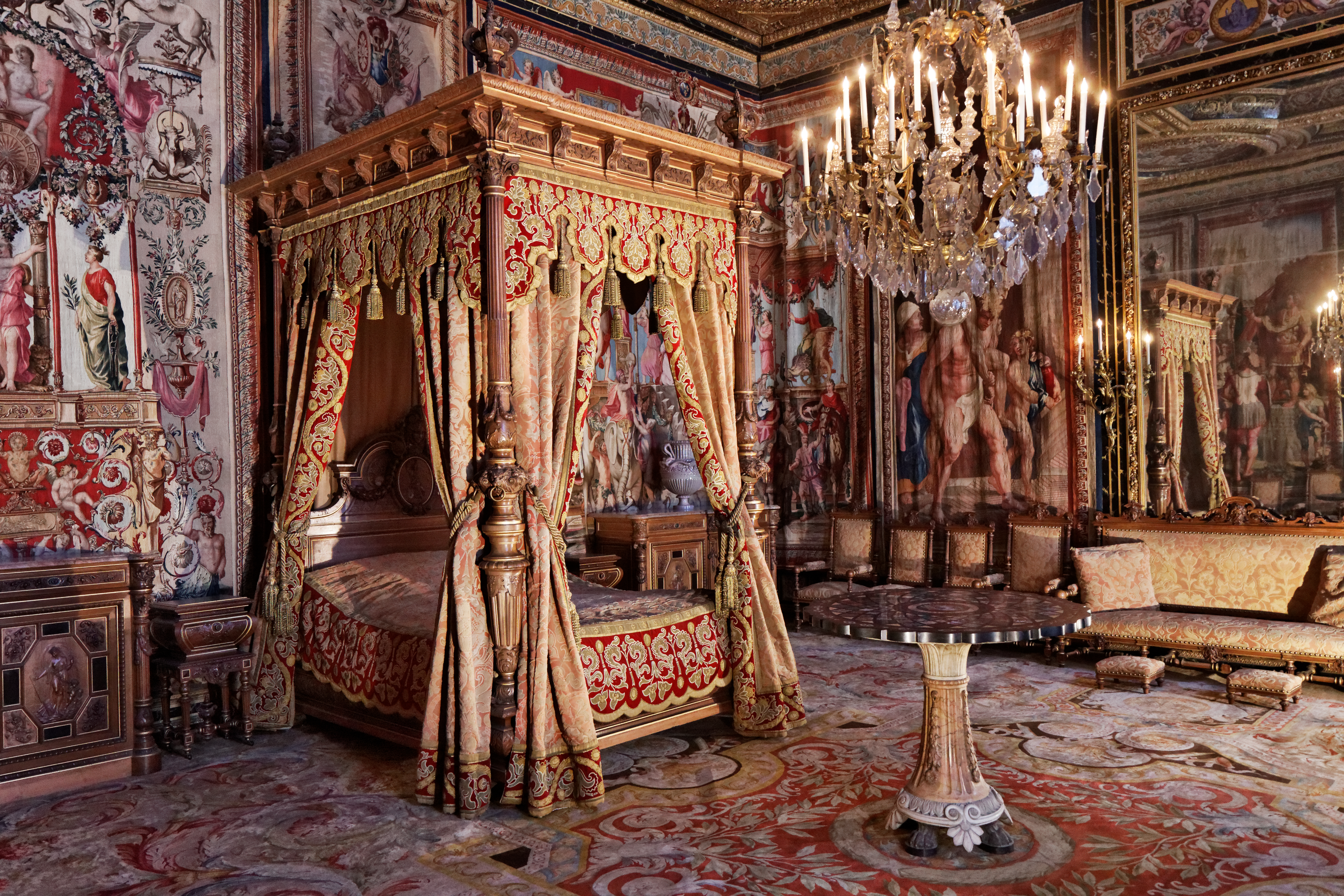 Vue de l'intérieur du château de Fontainebleau.